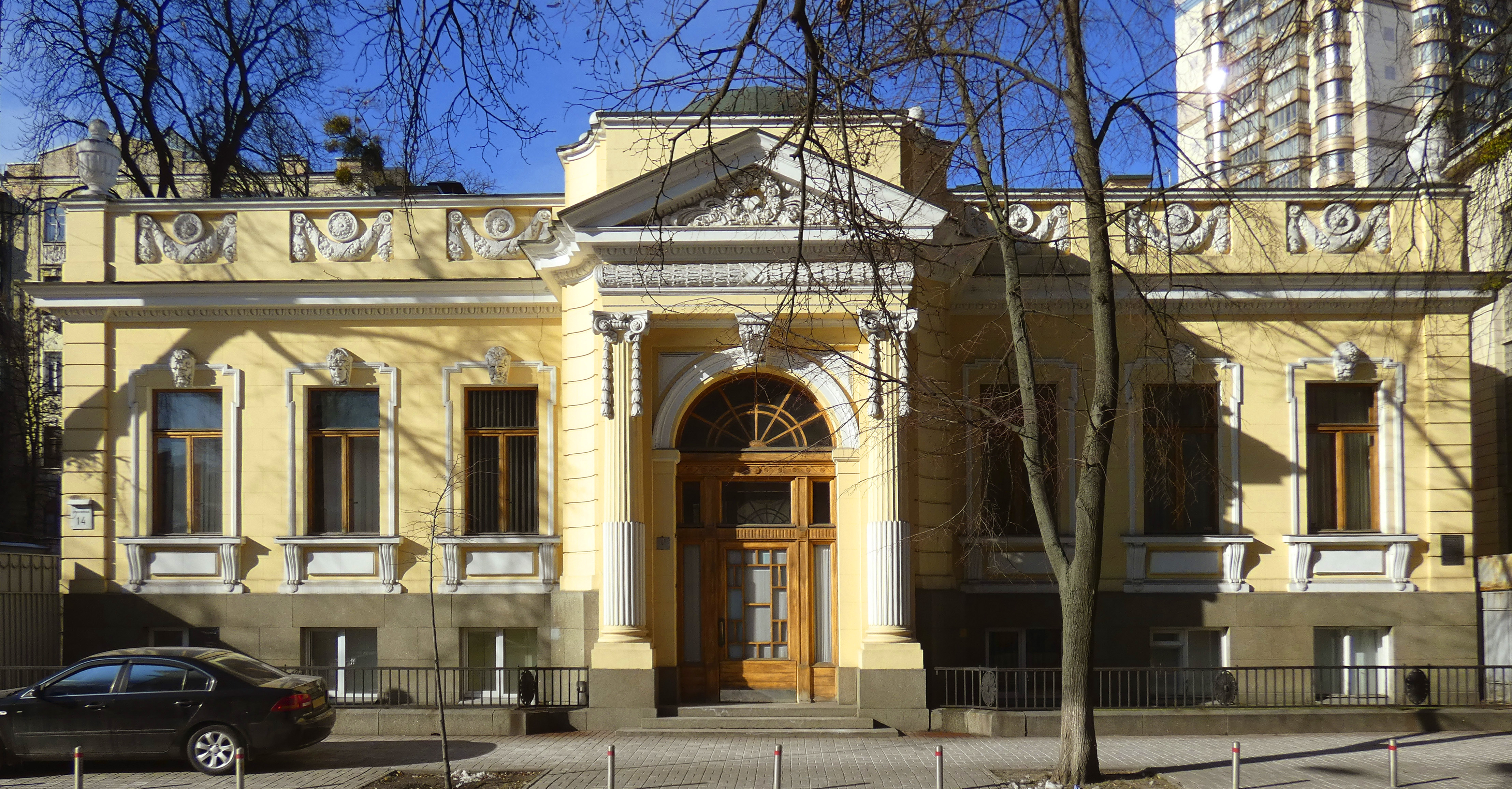 Особняк, в якому у 1919 р. розміщувався Всеукраїнський комітет охорони пам'яток мистецтва та старовини, Київ, Шовковична вул., 14